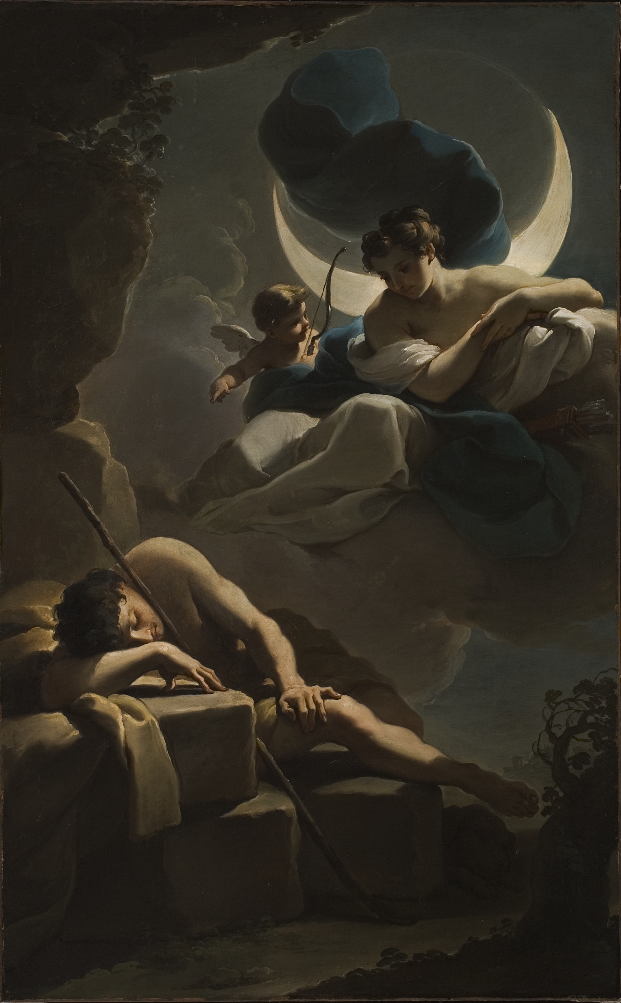 frame dimensions: 89.5 × 57.5 × 4.2 ″ (227.3 × 146 × 10.7 cm)